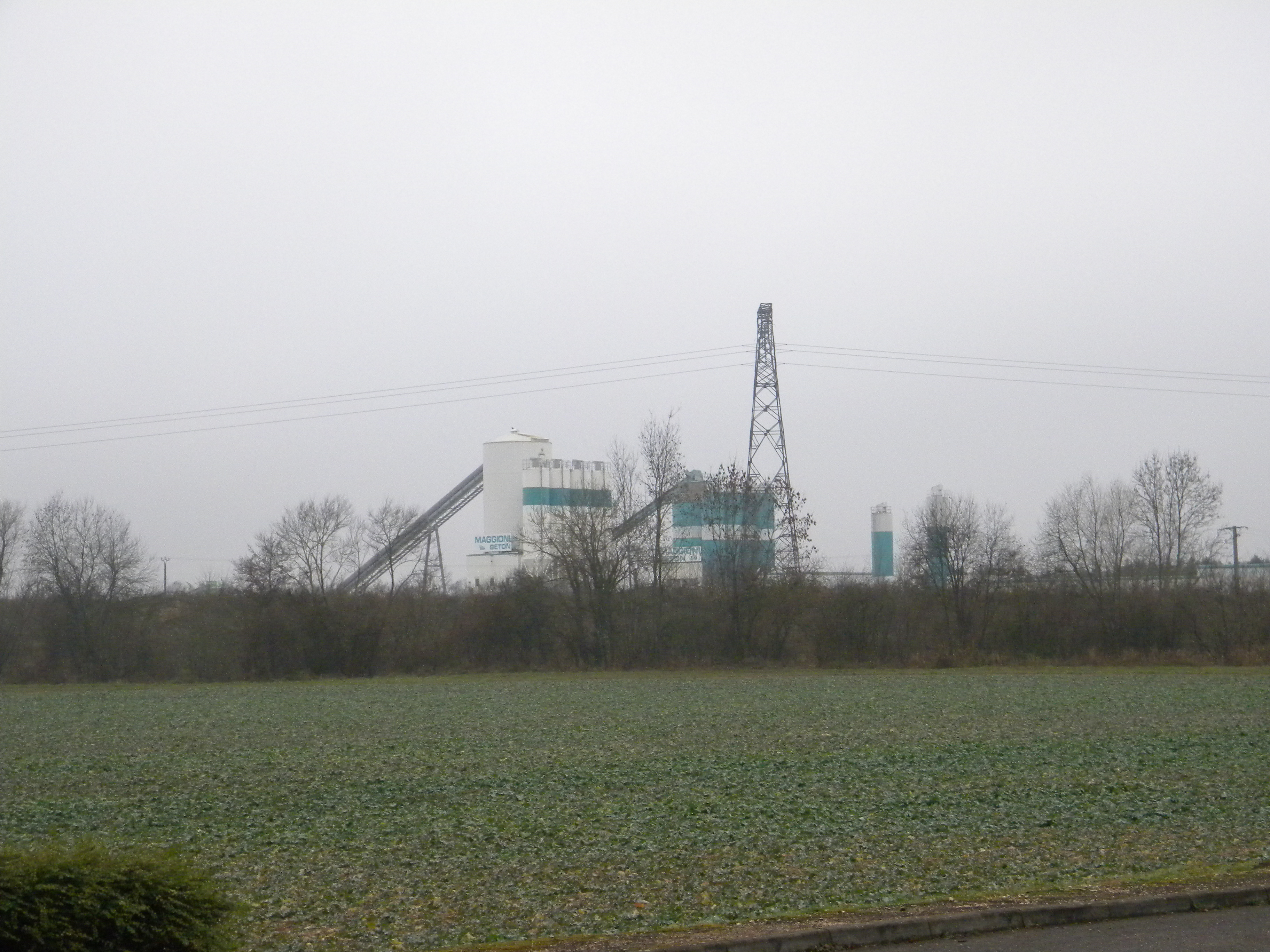 Bressey-sur-Tille betonejo